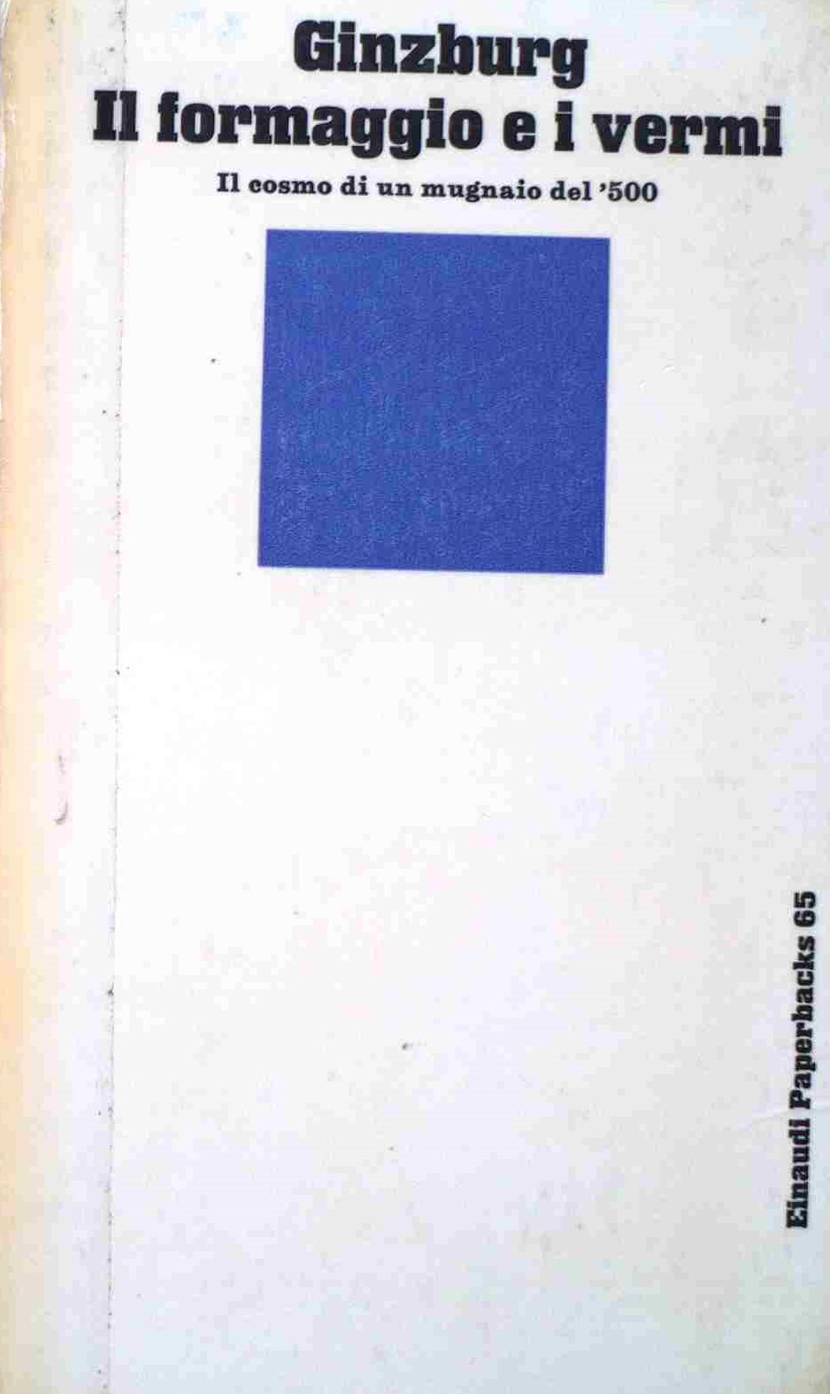 Carlo Ginzburg Il formaggio e i vermi Torino: Einaudi, 1976